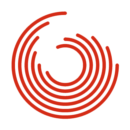 Logotip de Guanyem Barcelona